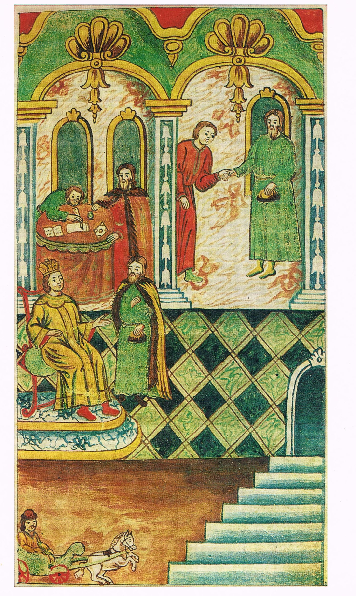 Миниатюра из рукописи 1-й пол. 18 века "История Петра I", соч. П. Крекшина. Собрание А. Барятинского. ГИМ. Симеон Полоцкий проверяет знания Никиты Зотова.